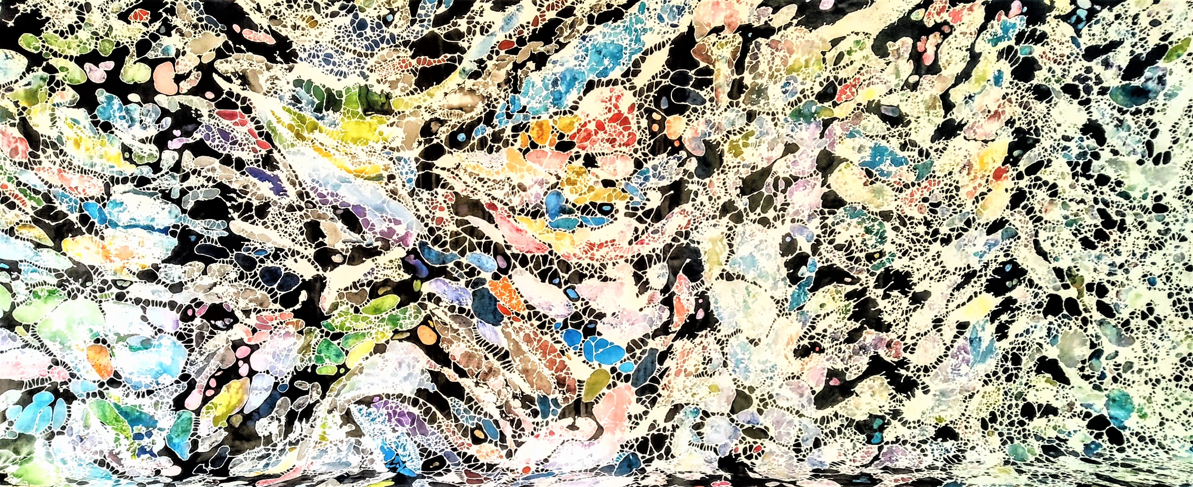 Obra realizada en relación a la enfermedad del Alzheimer